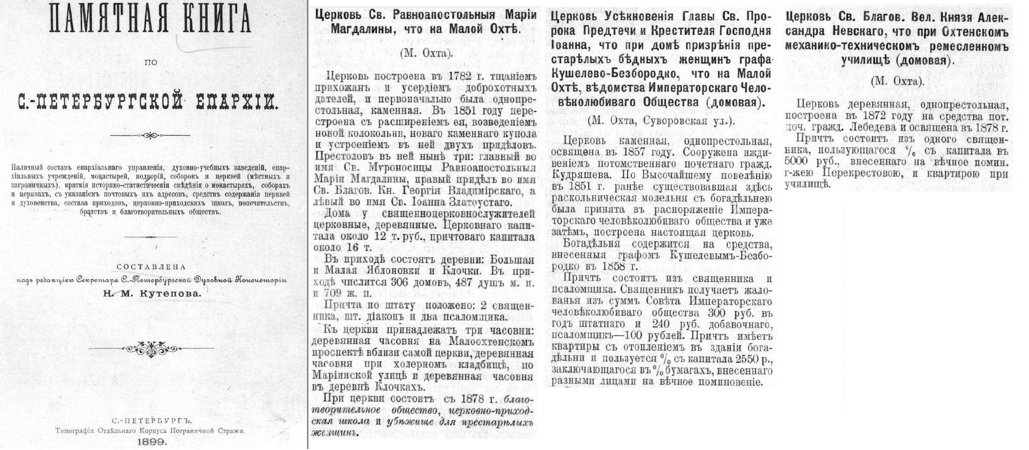 Копия страниц книги "Памятная книга по С.-Петербургской епархии"